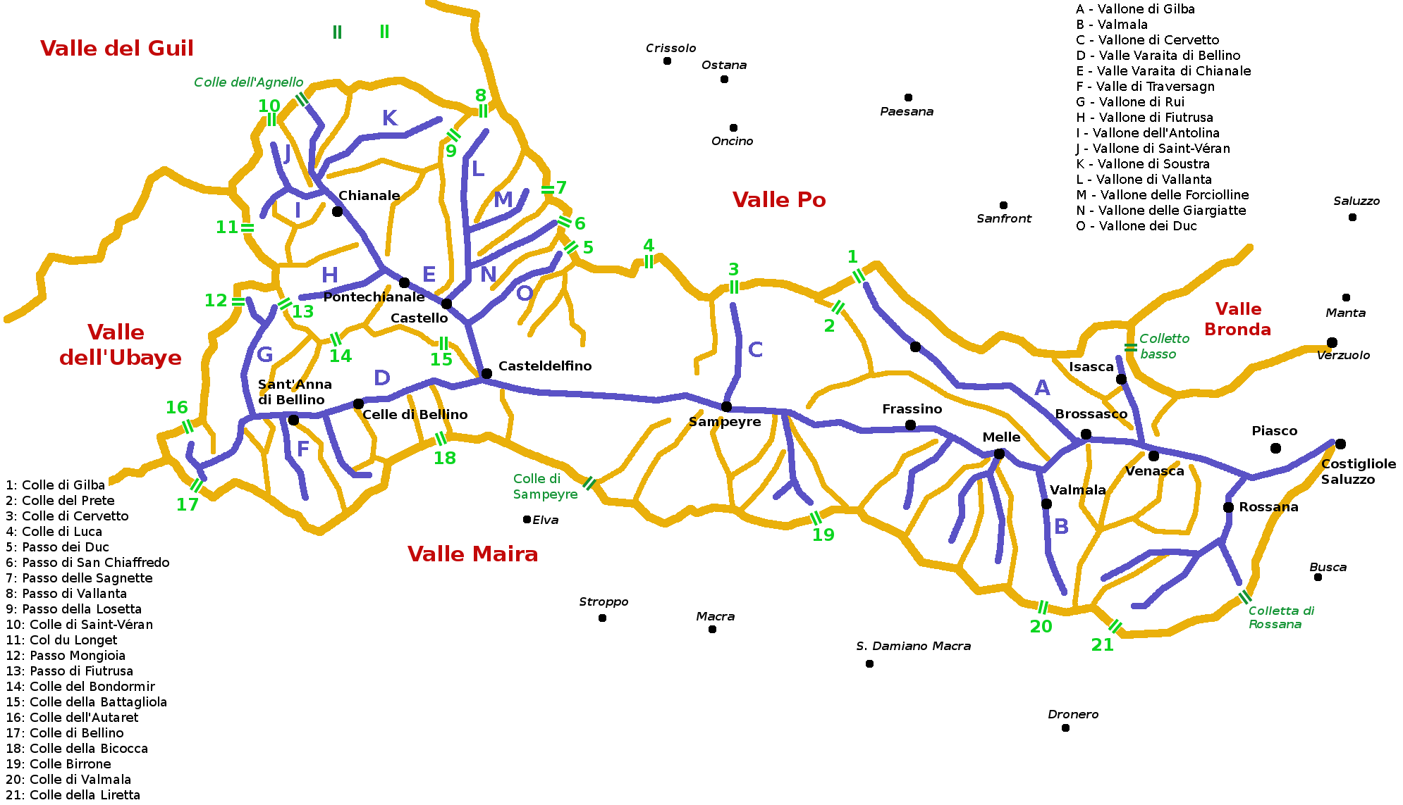 Schema strutturale della valle Varaita. Legenda colori: arancione: creste spartiacque blu: fondovalle e valloni principali (didascalia separata - lettere) verde scuro: valichi carrozzabili (didascalia in corpo) verde chiaro: valichi non carrozzabili (didascalia separata - numeri) nero: centri abitati